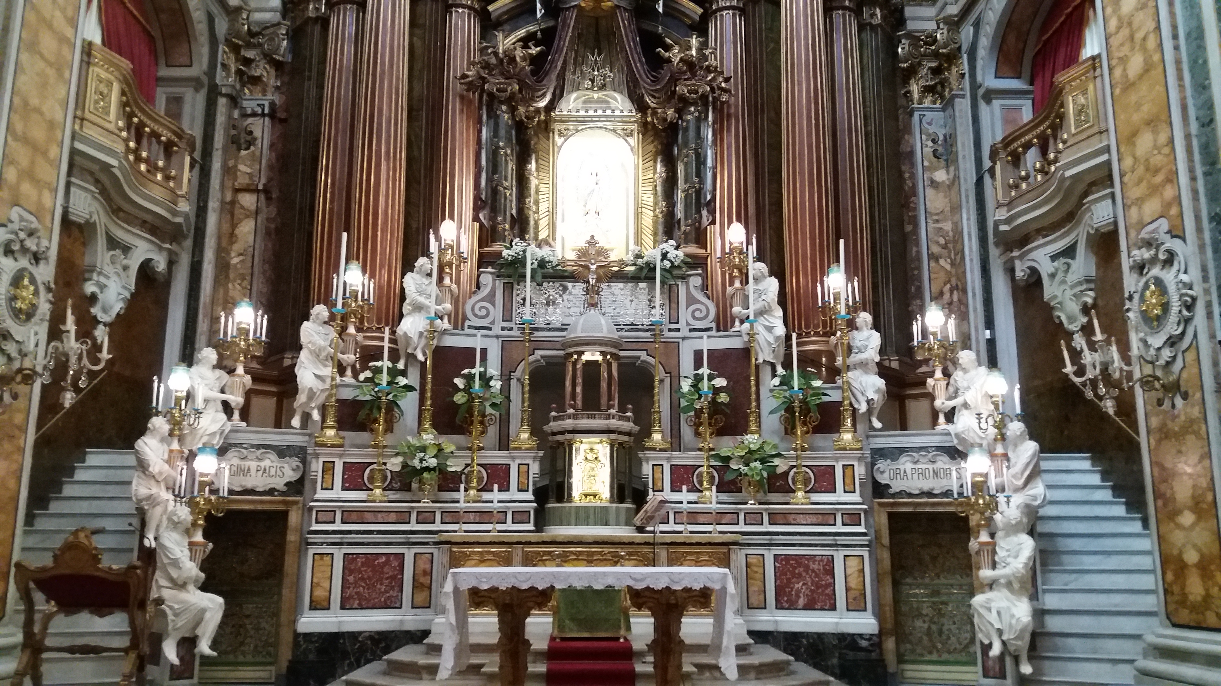 Altare maggiore Gesù Vecchio